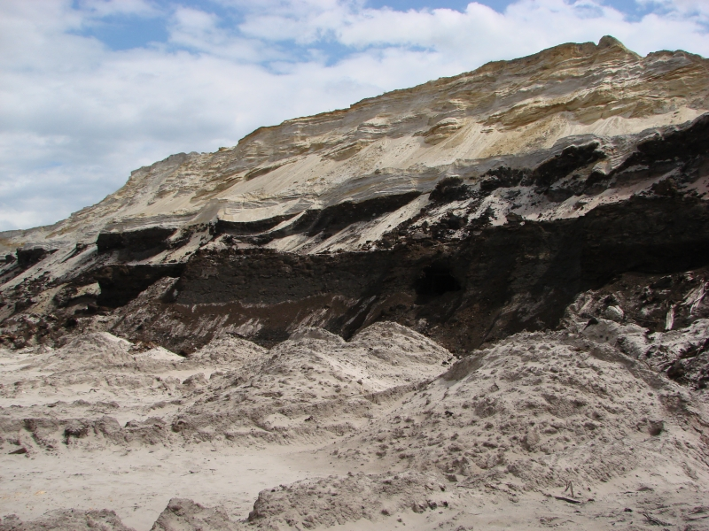 Reste des ersten Lausitzer Flözes, das bei der Abaggerung des Deckgebirges sichtbar wird.